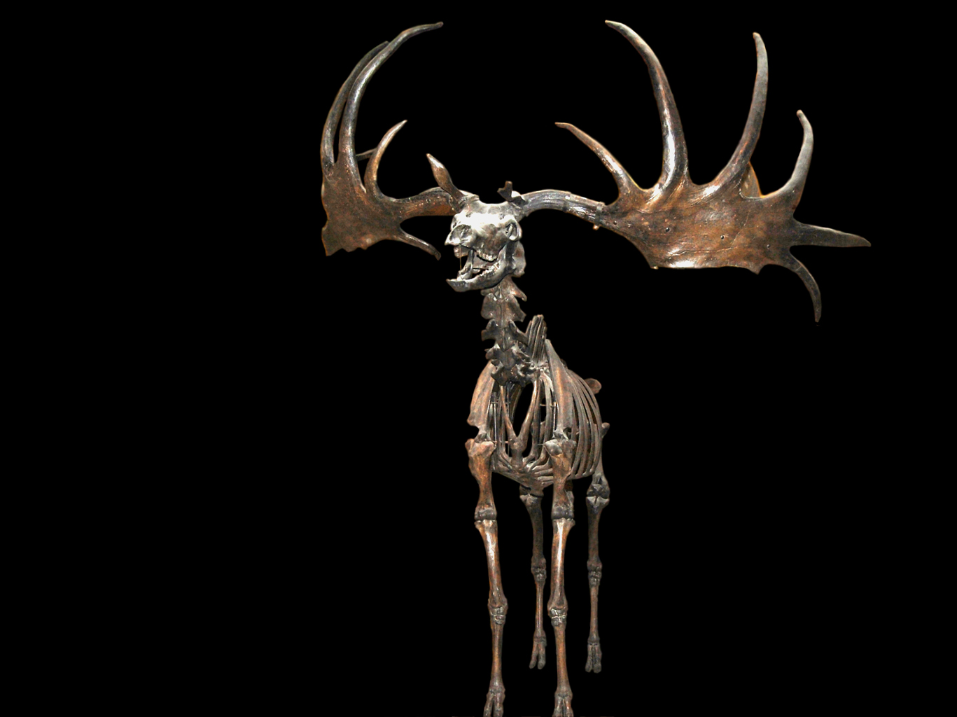 Naturhistorisches Museum Wien